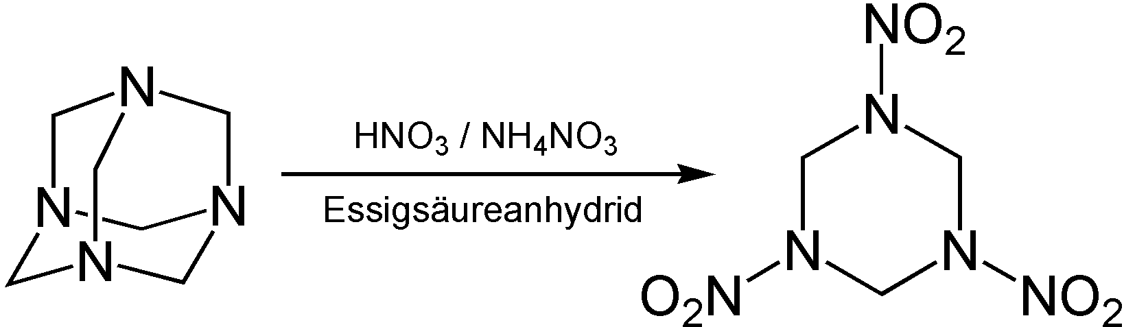 Hexogendarstellung